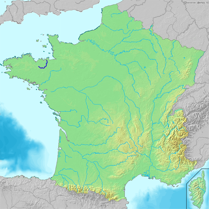 Rance in Frankreich; basiert auf France_with_Corsica2_(demis).png